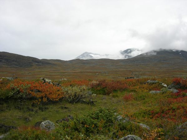 Sarek i september Fotograf: Magnus Helander - helander at fastmail dot fm - 2005